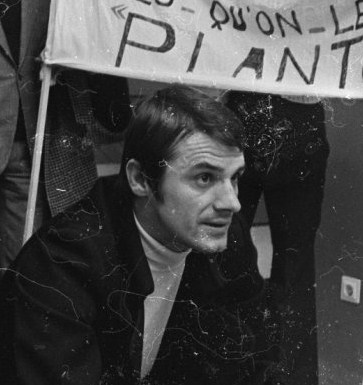 Josip Skoblar en 1971